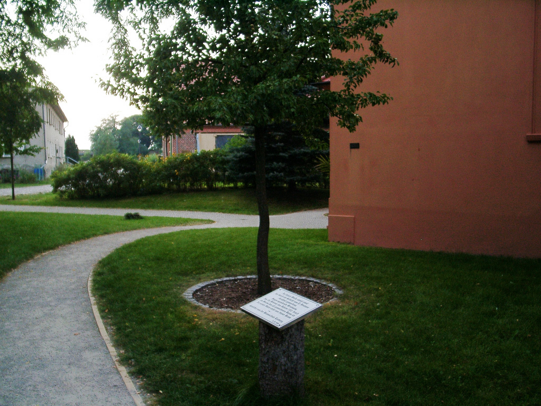 Neugepflanzter Birnbaum an der Kirche zu Ribbeck